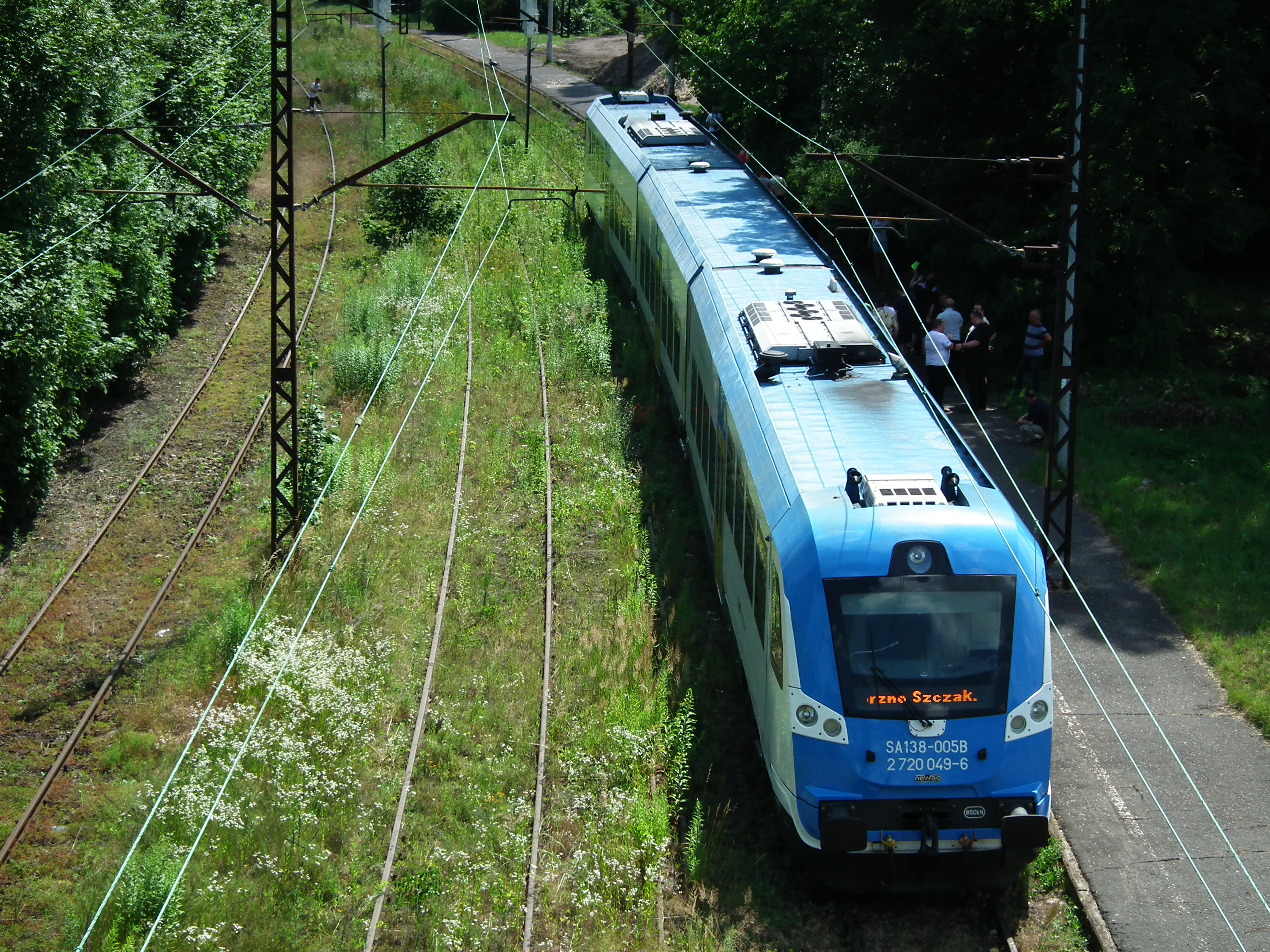 Impreza kolejowa pt. Zagłębiowskie Zakamarki, zorganizowana w dniu 2.7.2016r. na liniach Zagłębia Dąbrowskiego i obsługiwana przez SA138-005. Sosnowiec Kazimierz.